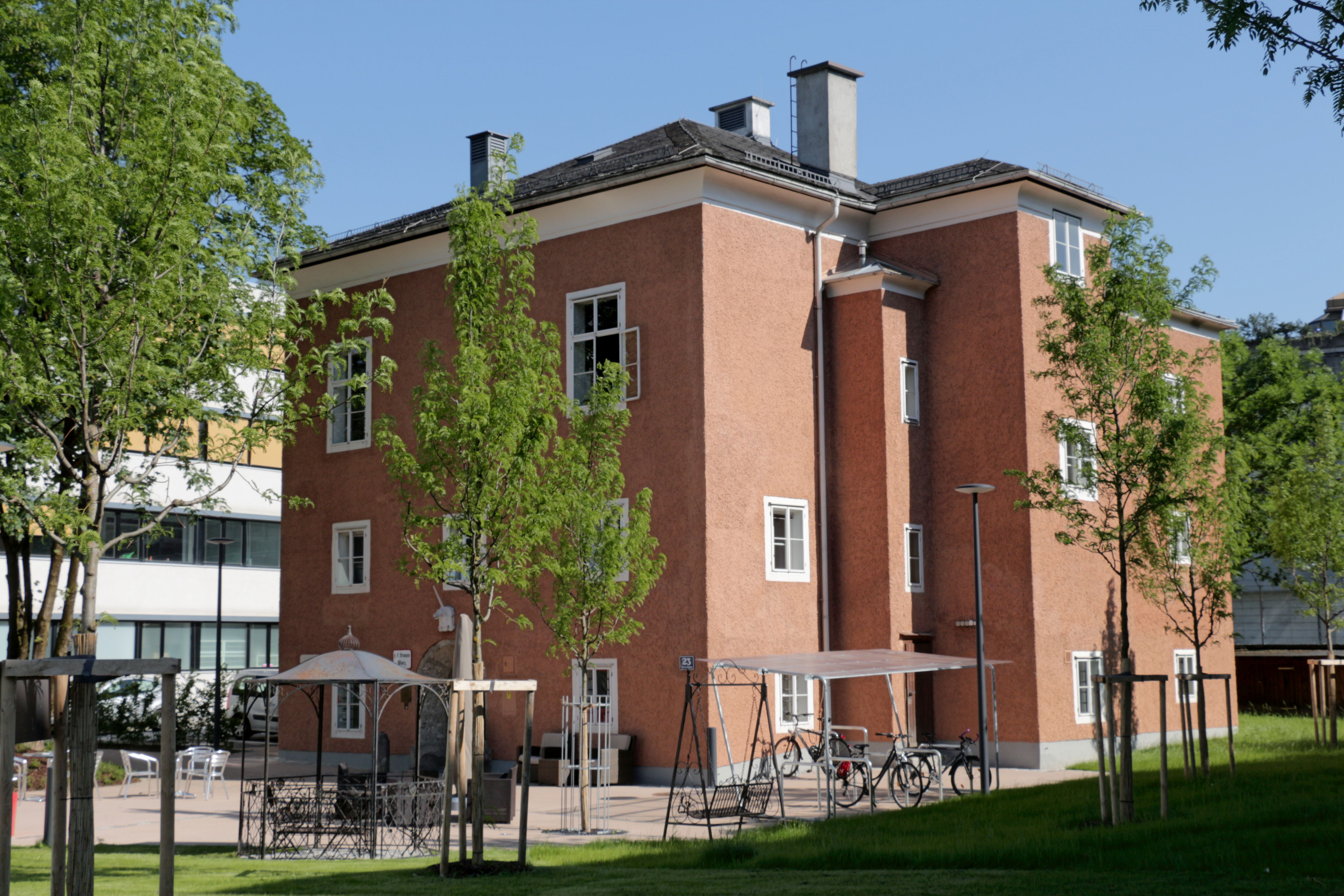 Das Literaturhaus Salzburg im Stadtteil Lehen